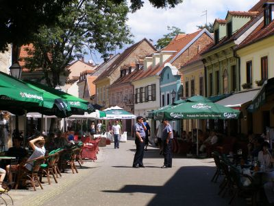 Zagreb, Croatia